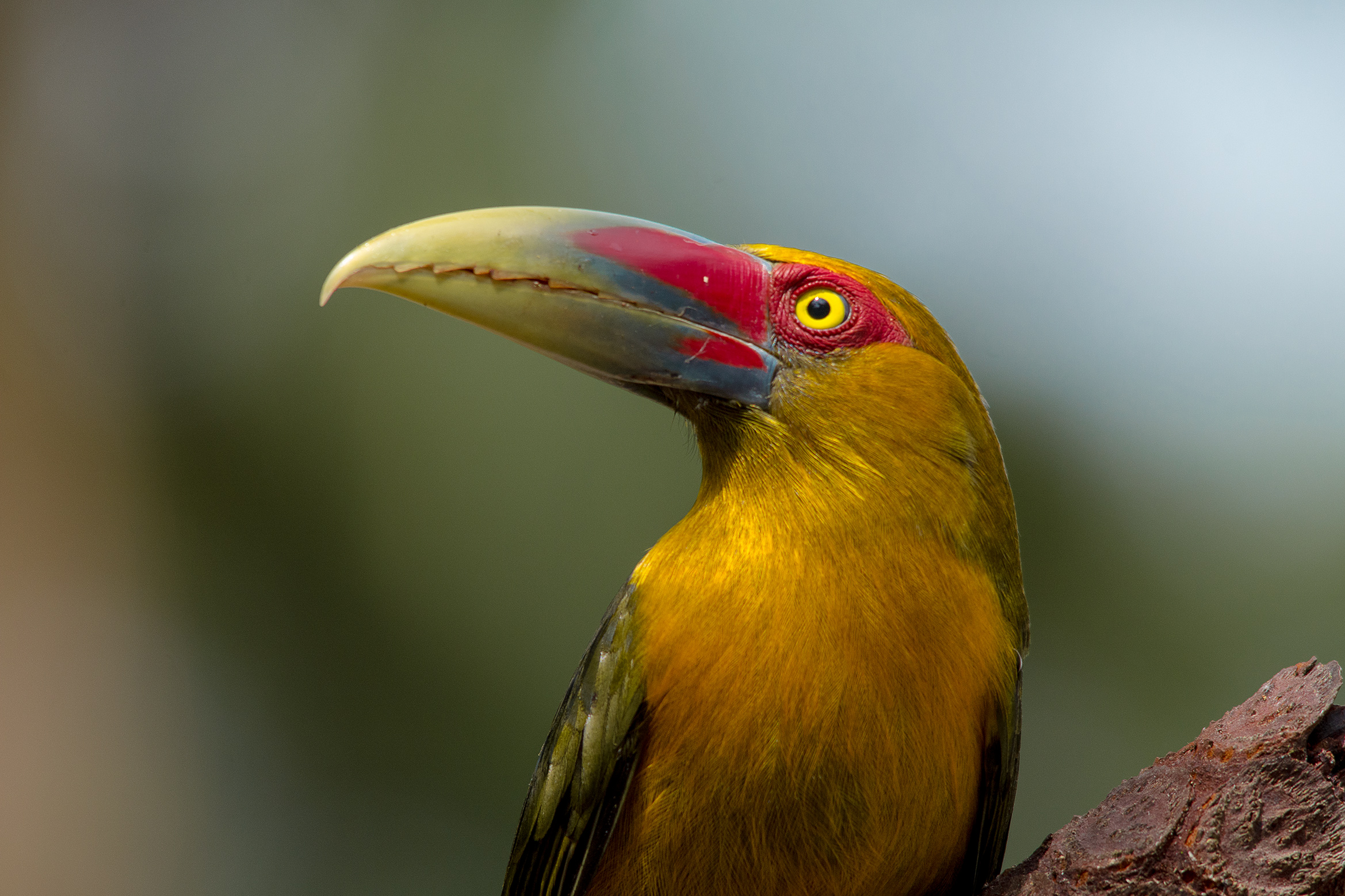 Registro efetuado em Tapitaí-SP, na trilha dos Tucanos. Bioma: Mata Atlântica.